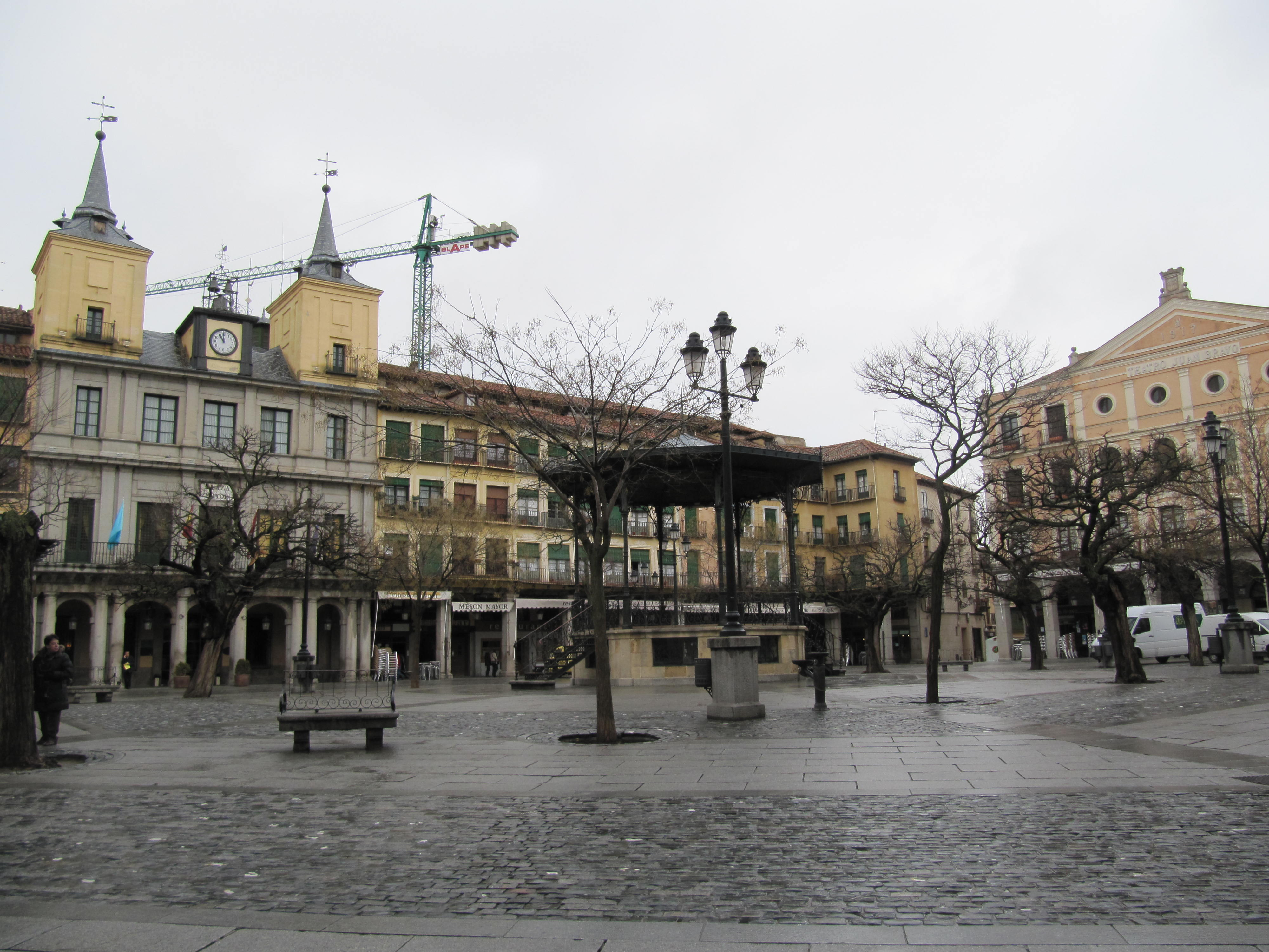 Segovia, Plaza Mayor.